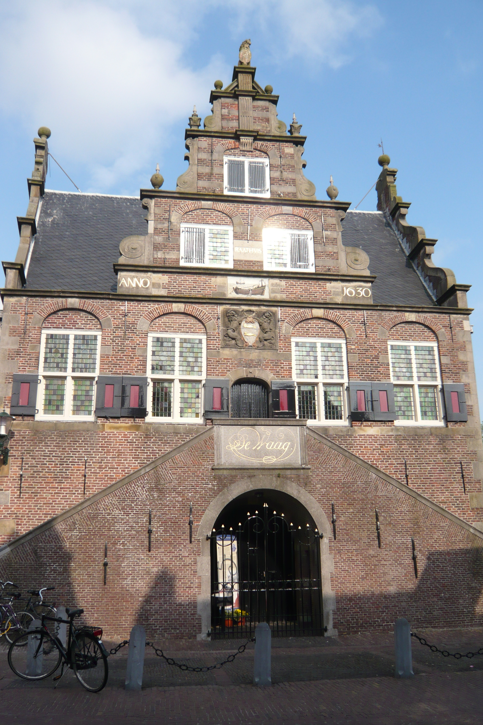 De Waag, Jan Adriaanszoon Leeghwater (architect 1630). Raadhuis (city hall), De Rijp